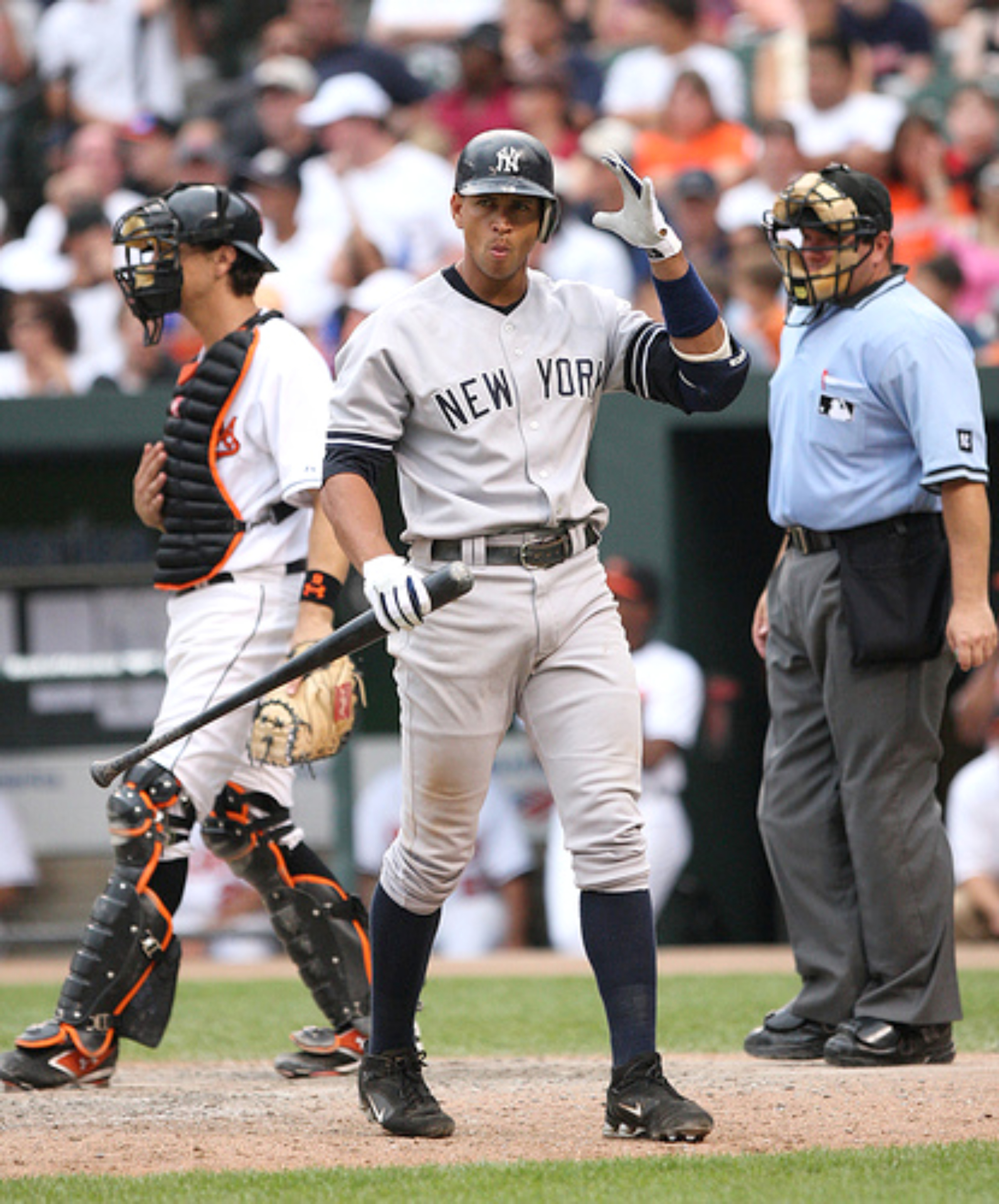 Alex Rodriguez